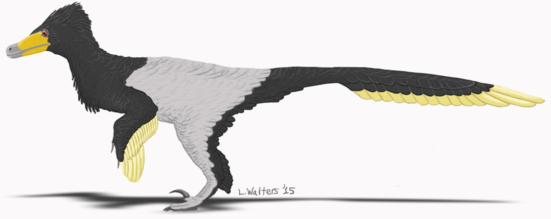 Velociraptor mongoliensis.